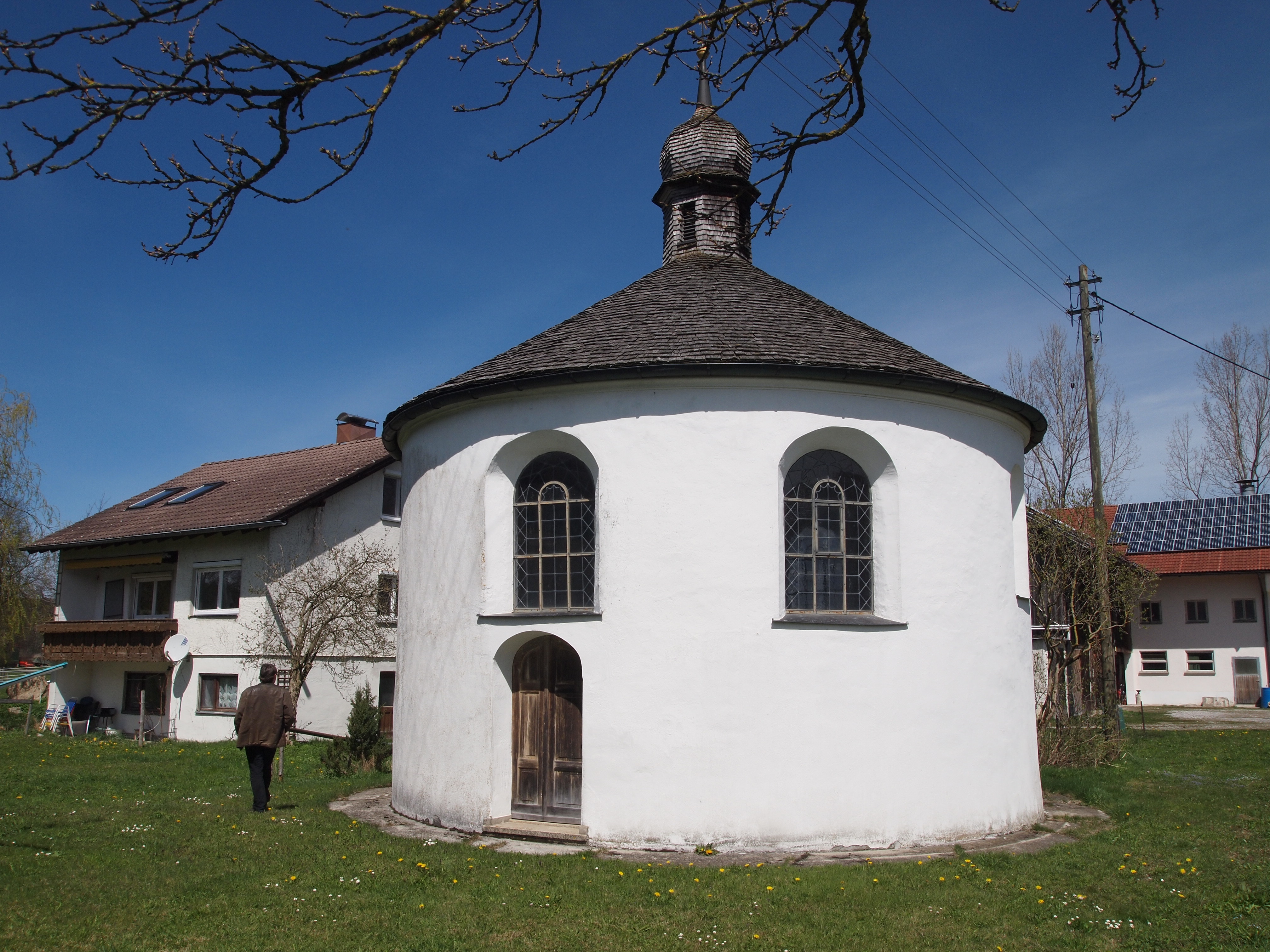 Westerried, Antoniuskapelle